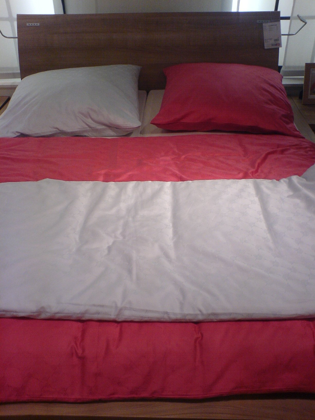 Rot-weiße Bettbezüge